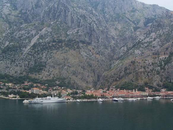 Kotor, panorama, Nikostrat Saronski